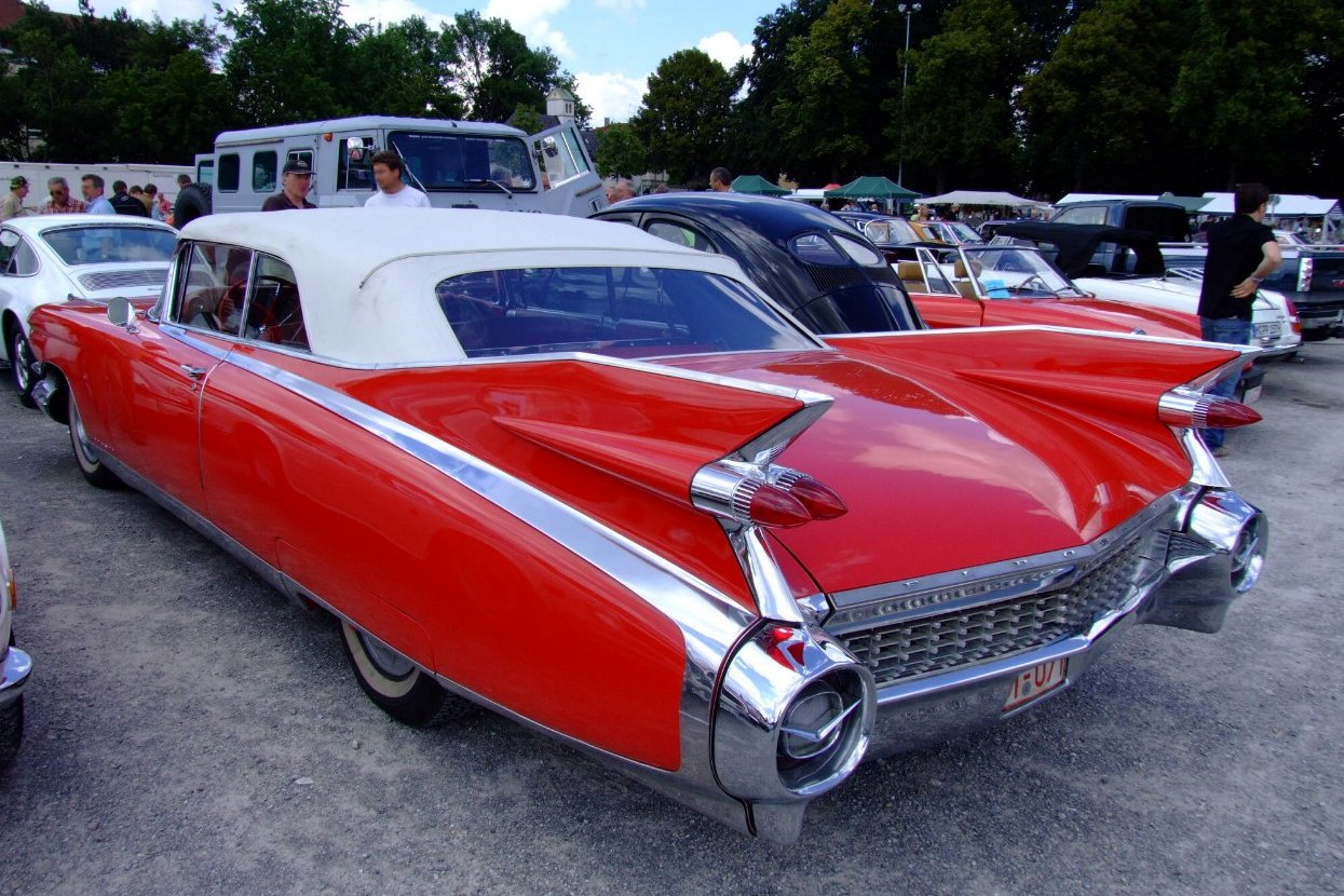 1959 Cadillac Eldorado Biarritz Quelle: selbst fotografiert, 07/2006 Fotograf: Späth Chr.